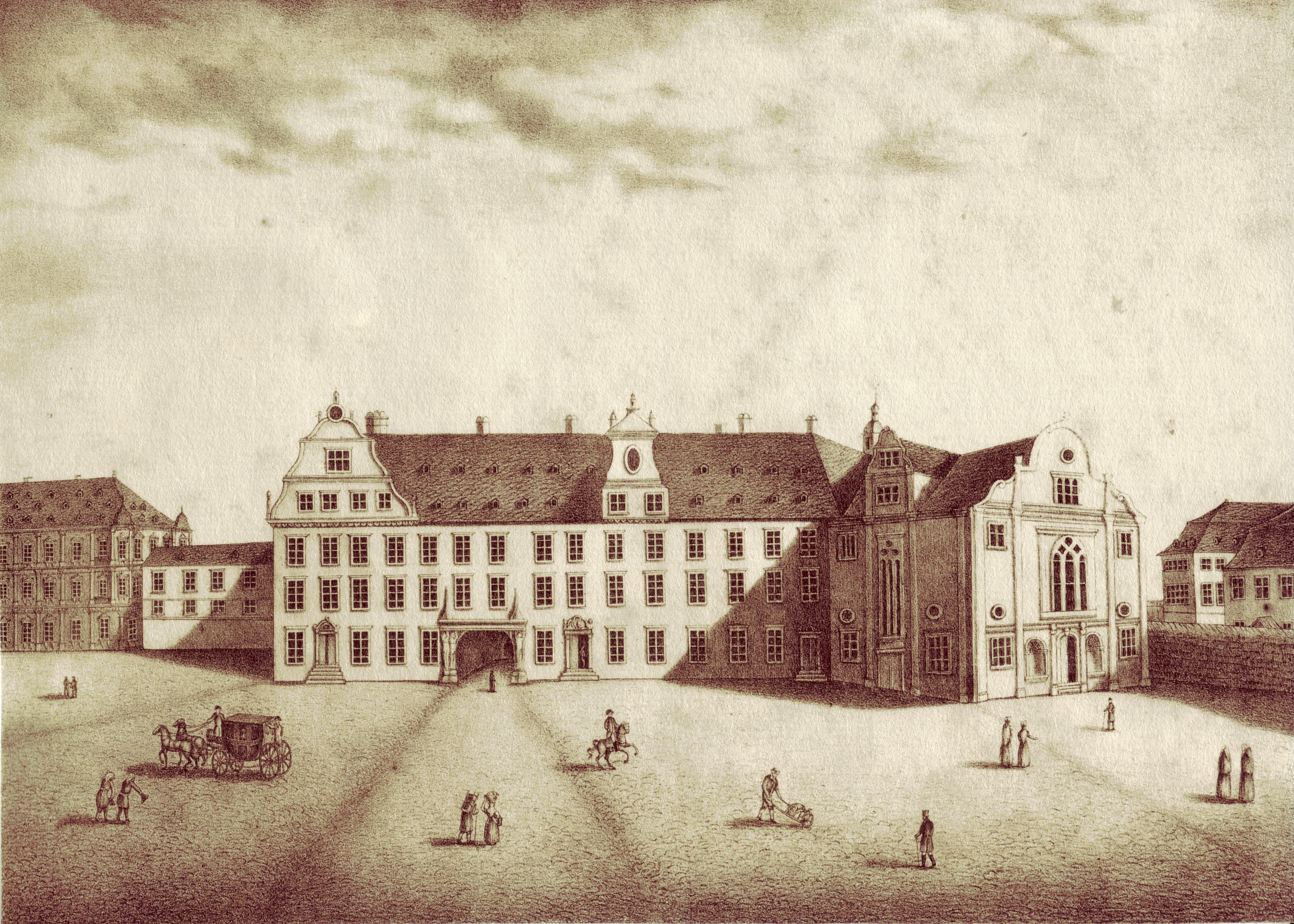 [Originalbeschreibung] Die Schlosskapelle oder die St. Gangolfts Stiftskirche nebst den Kurfürstlichen Canzlei und Regierungs-Gebäuden unter welchem das Schloß und Stadt-Thor angebracht war. Erbaut vom Erzbischof und Kurfürsten von Mainz Daniel Brendel von Homburg; abgerissen im Merz 1814.